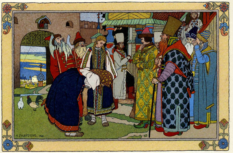 Иван Билибин. Василиса Прекрасная и царь